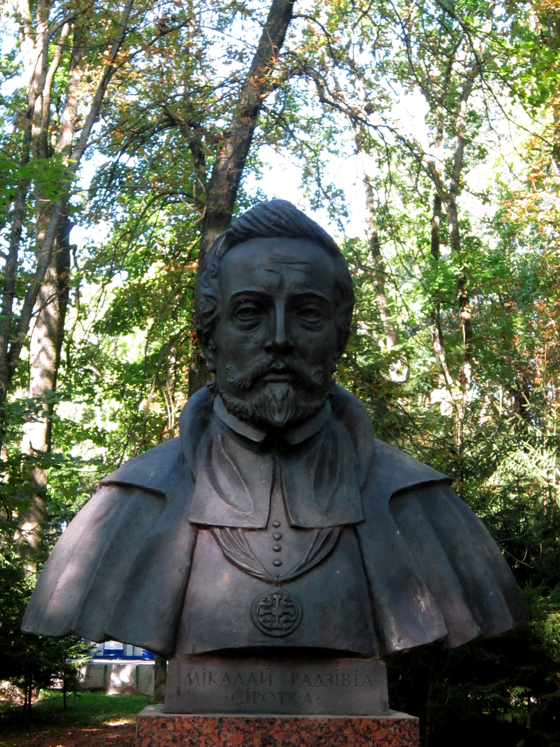 Бюст Николая Кшиштофа Радзивилла Сиротки в Старом парке Несвижского дворцово-паркового ансамбля.